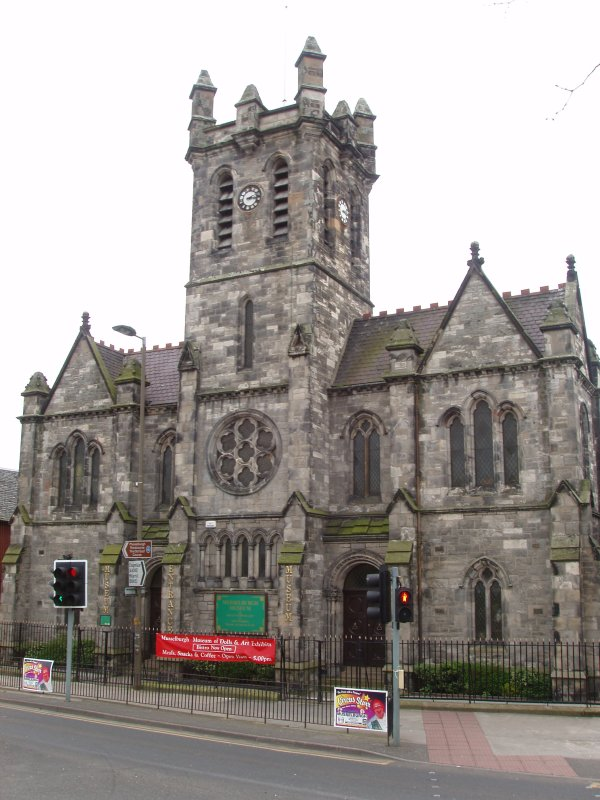 Musselburgh Museum